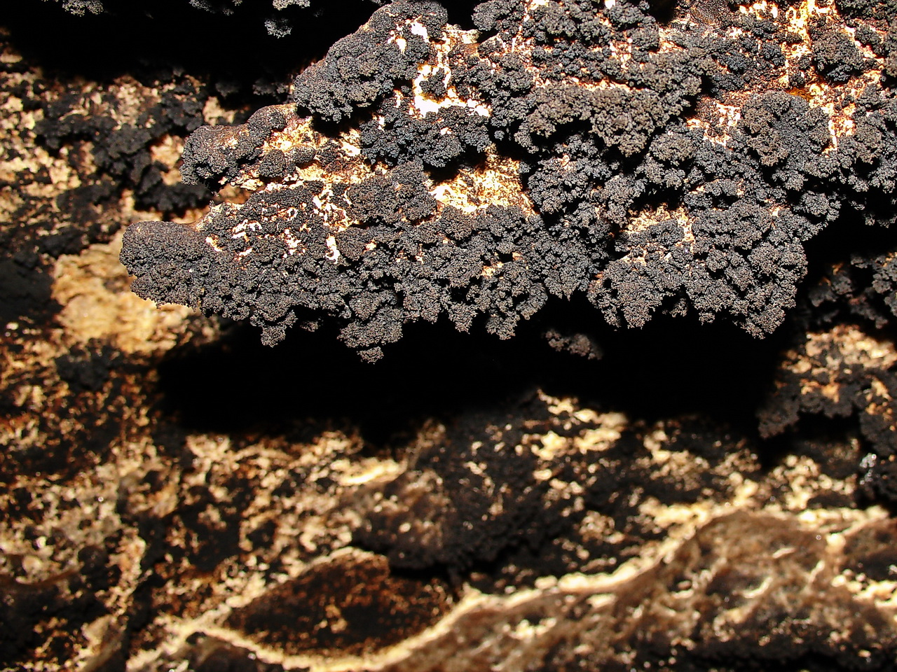 Карстовая пещера «Емил Раковицэ» и прилегающая карстовая зона, монумент природы, находится в Бриченский район, У с.Крива (код MD-BR-mn.A-003) A-003